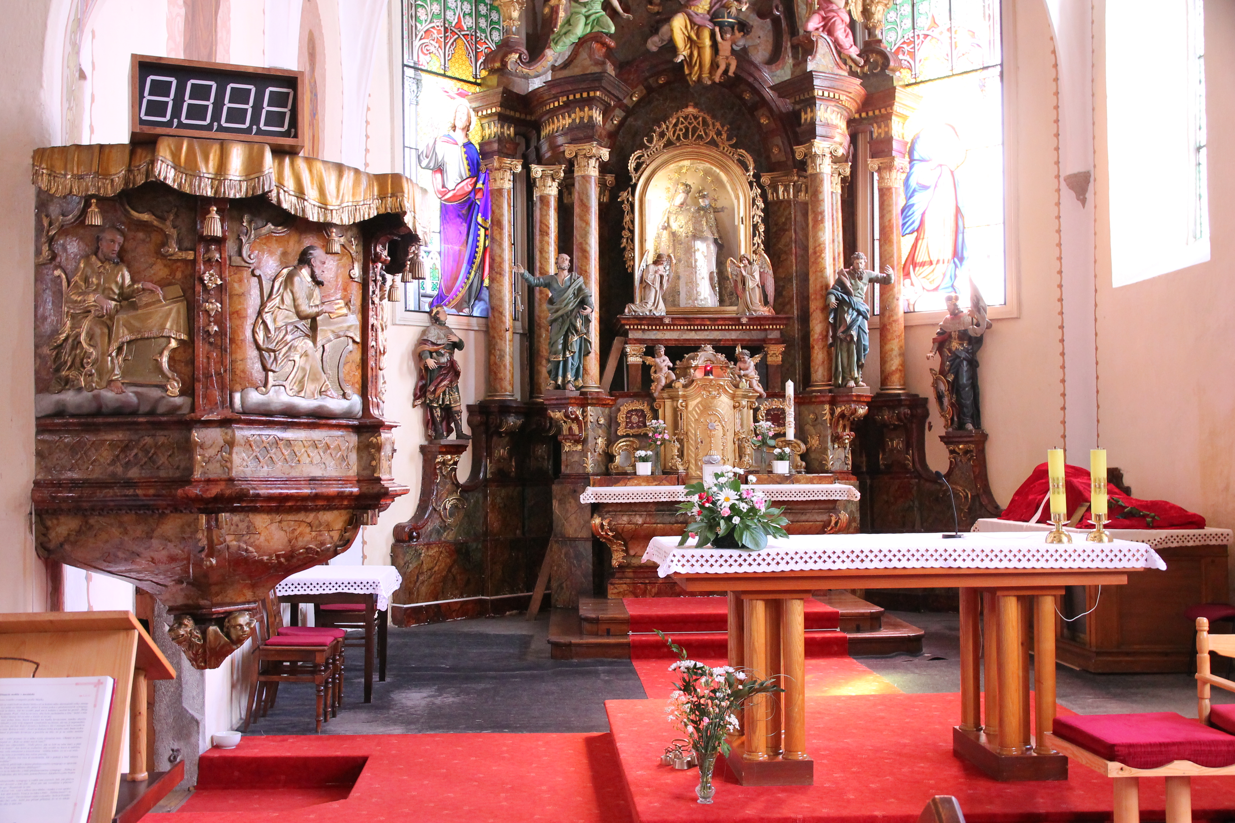 oltář, svatostánek, kazatelna